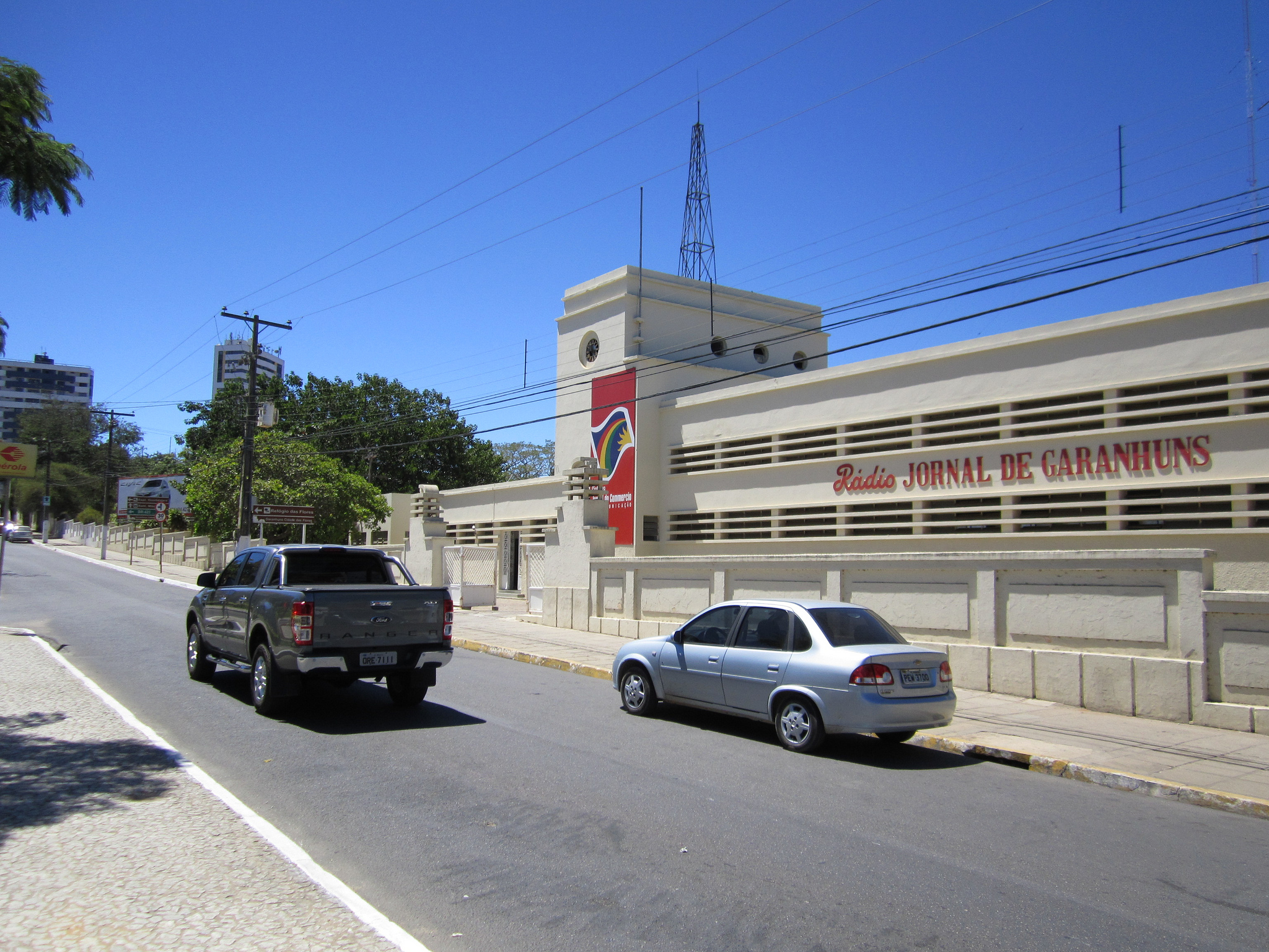 Rádio Jornal - Garanhuns, Pernambuco, Brasil